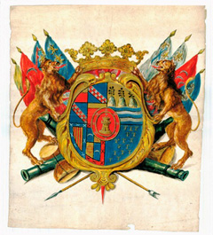 Escudo de armas del marqués de Sentmenat